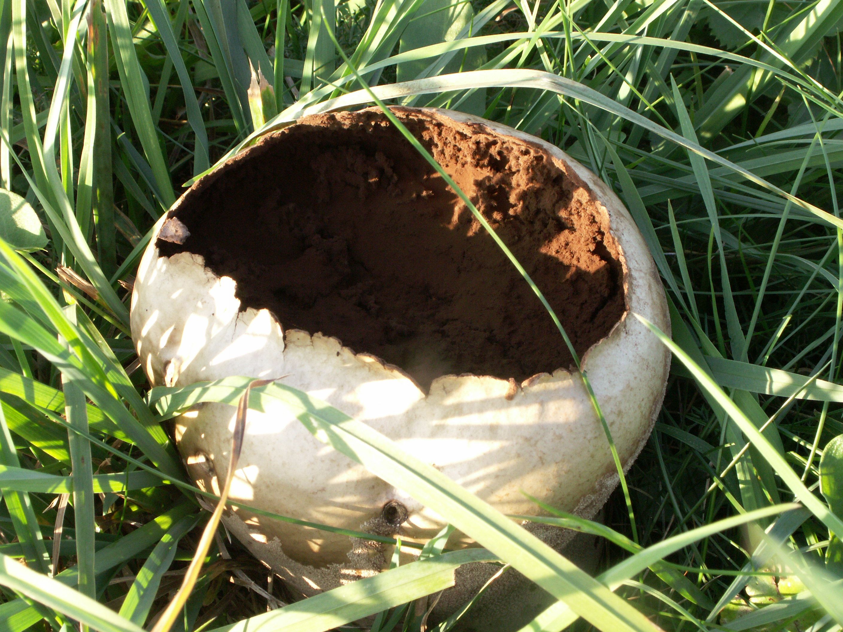 Vascellum pratense, Weide, etwa 12 cm Durchmesser